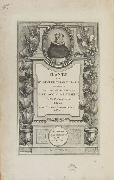 Page de titre de Plantae per Galliam, Hispaniam et Italiam observatae, iconibus aeneis exhibitae a R. P. Jacobo Barreliero,... opus posthumum accurante Antonio de Jussieu,... in lucem editum... (S. Ganeau, Paris), 2 parties en 1 vol. in-fol., front. et pl. gravés.